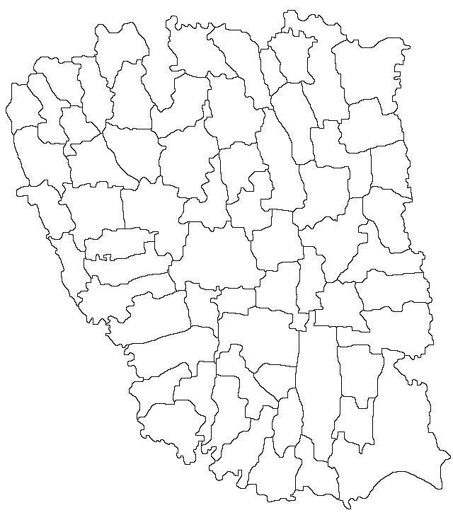 Categorie:Hărţi ale judeţului Galaţi